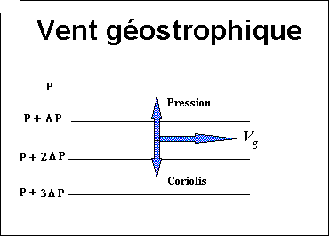 Le vent géostrophique est un équilibre entre la force de pression et celle de Coriolis dans un repère en rotation comme la Terre.